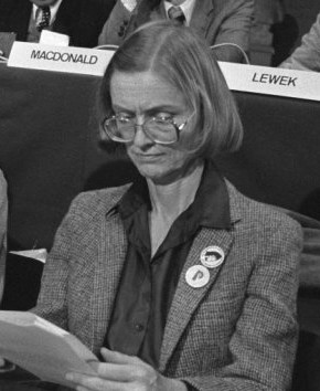 Openbare hoorzitting kernwapens en ontwapening, georganiseerd door de Wereldraad van Kerken in de VU. Van rechts naar links op de voorgrond de jury: (...) Vera Kistiakowsky (VS), (...)